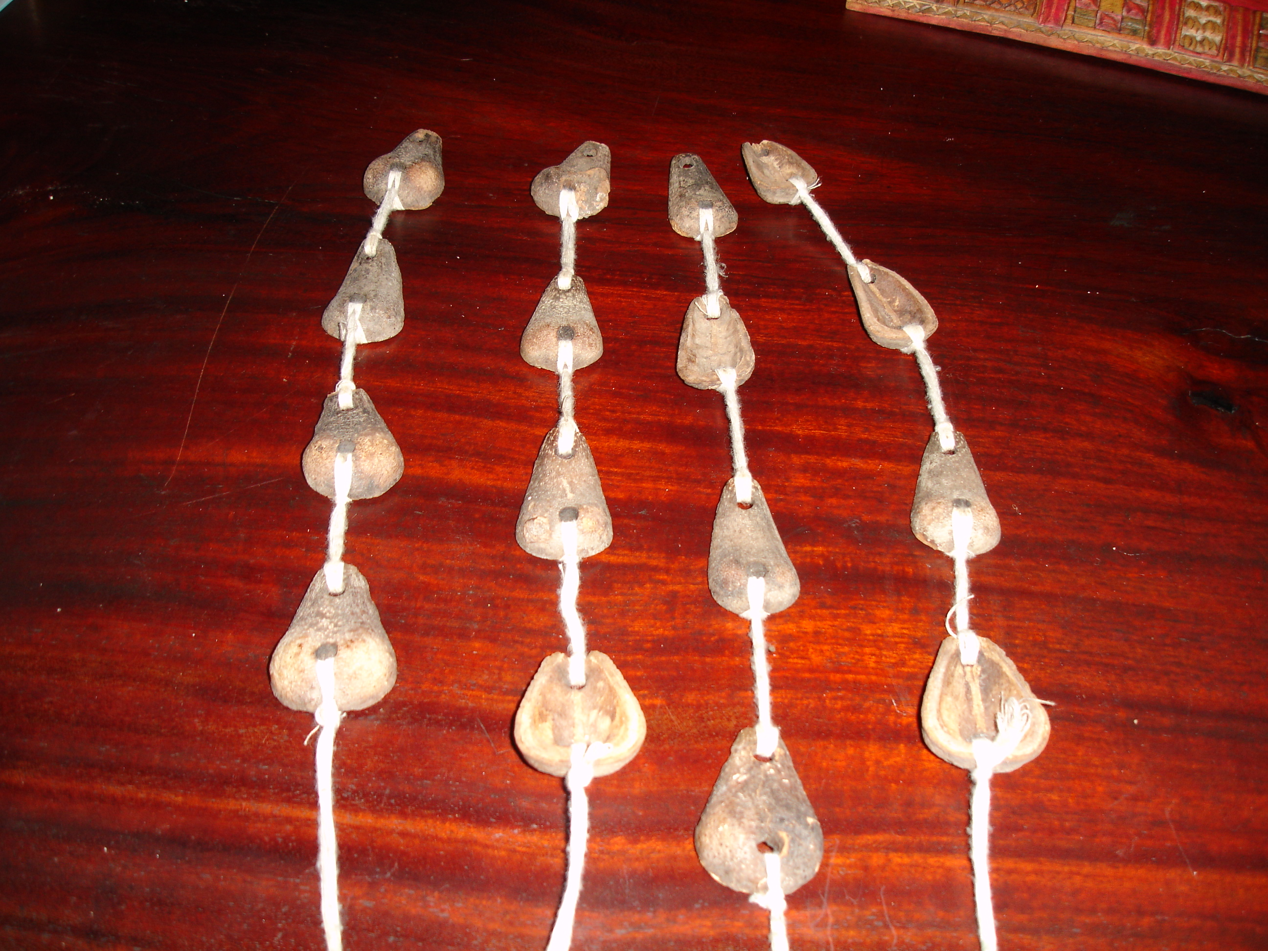 Opele Ifá Orossi